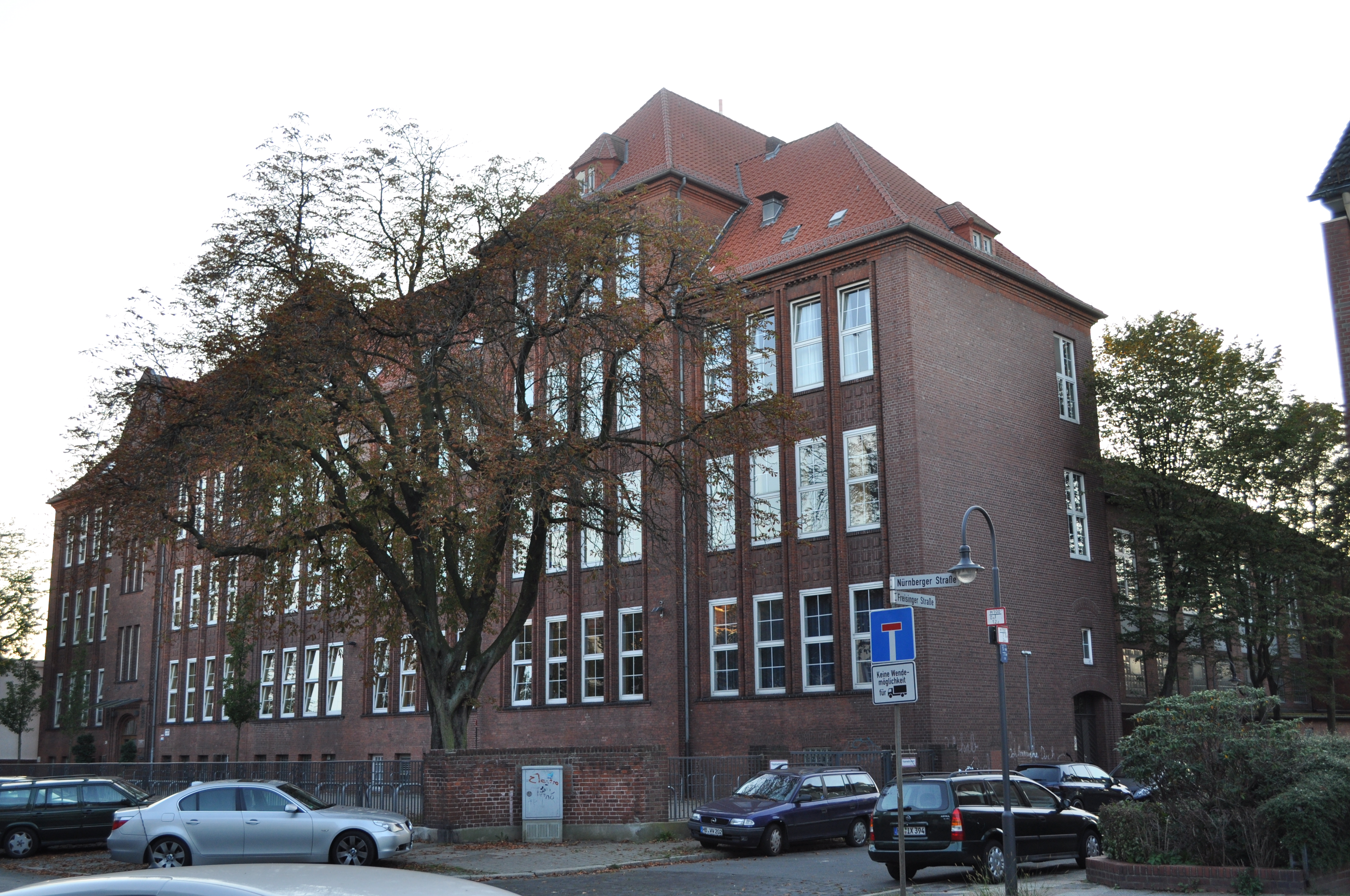 Volksschule in Bremen, Nürnberger Straße 34.Das abgebildete Objekt ist ein geschütztes Kulturdenkmal in der Freien Hansestadt Bremen, mit der Nr. 0939 beim Landesamt für Denkmalpflege registriert.